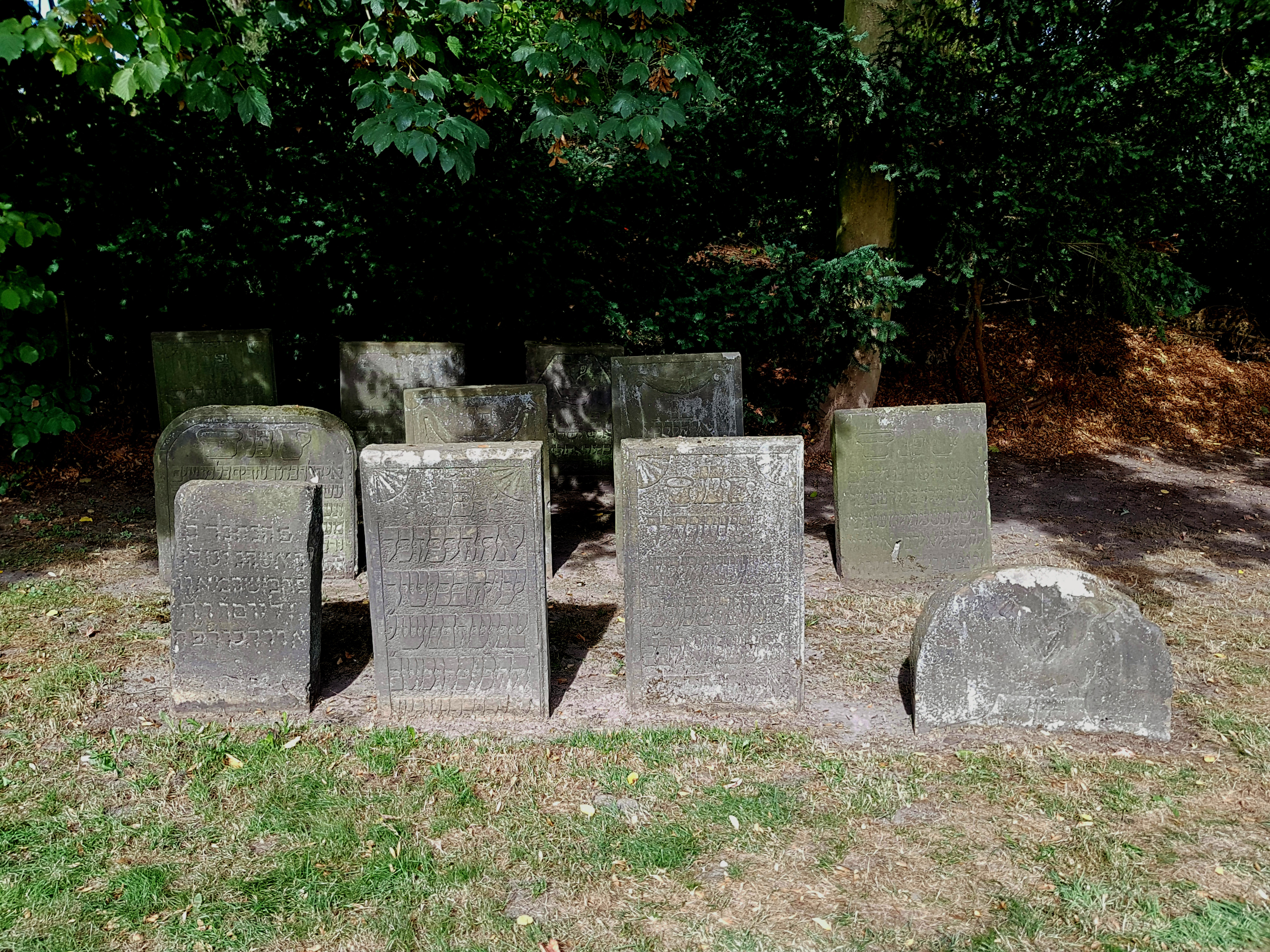 Historische Grabsteine vom alten Friedhof Bolbrinkersweg auf dem heutigen jüdischen Friedhof Bielefeld